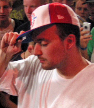 Kool Savas Eigene Aufnahmen (Benutzer:ToKo), 19. August 2005